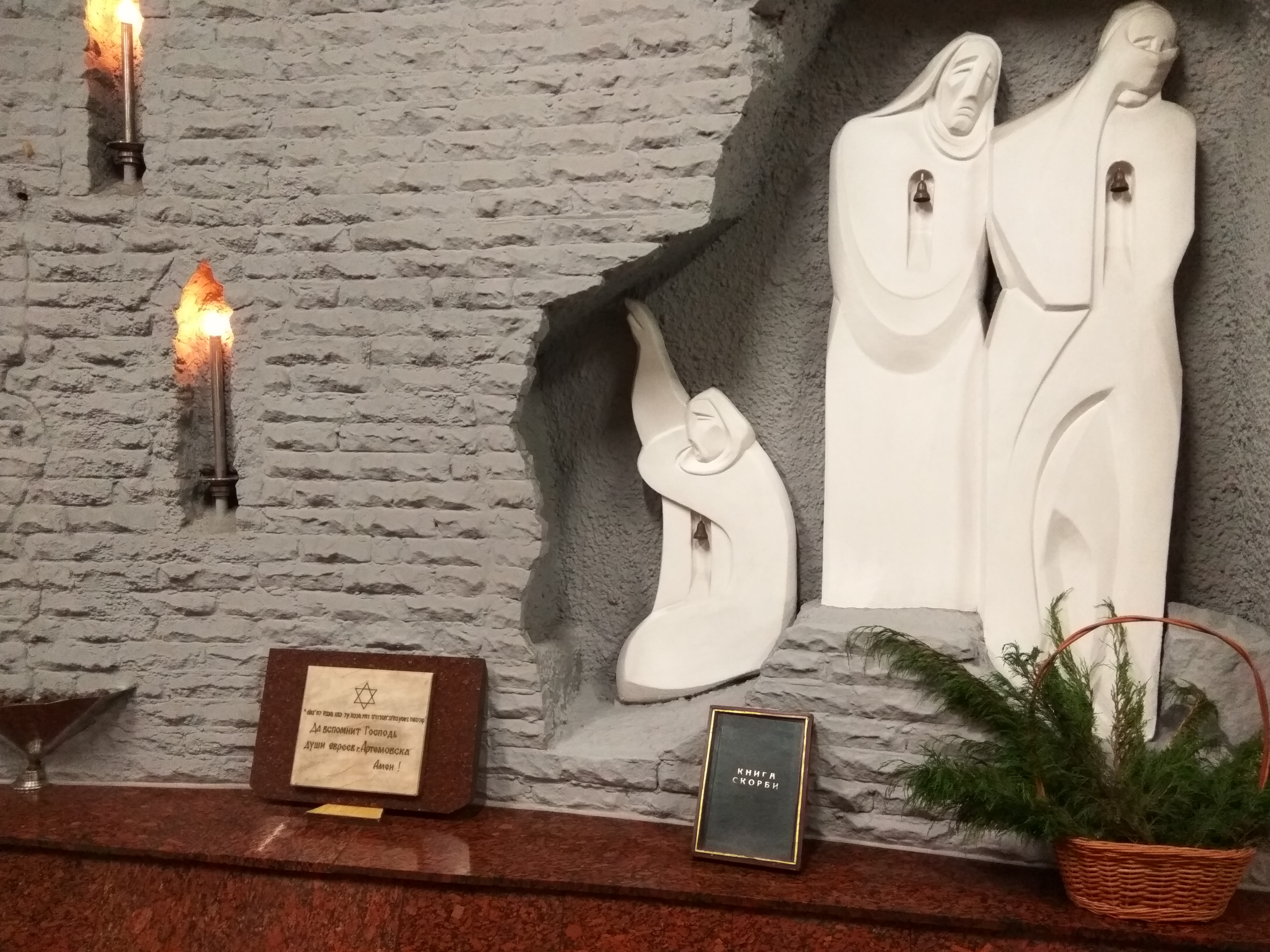 Місце масового знищення єврейського населення під час окупації м. Артемівська, Бахмут, вул. Патріса Лумумби, 87, підземна виробка заводу шампанських вин